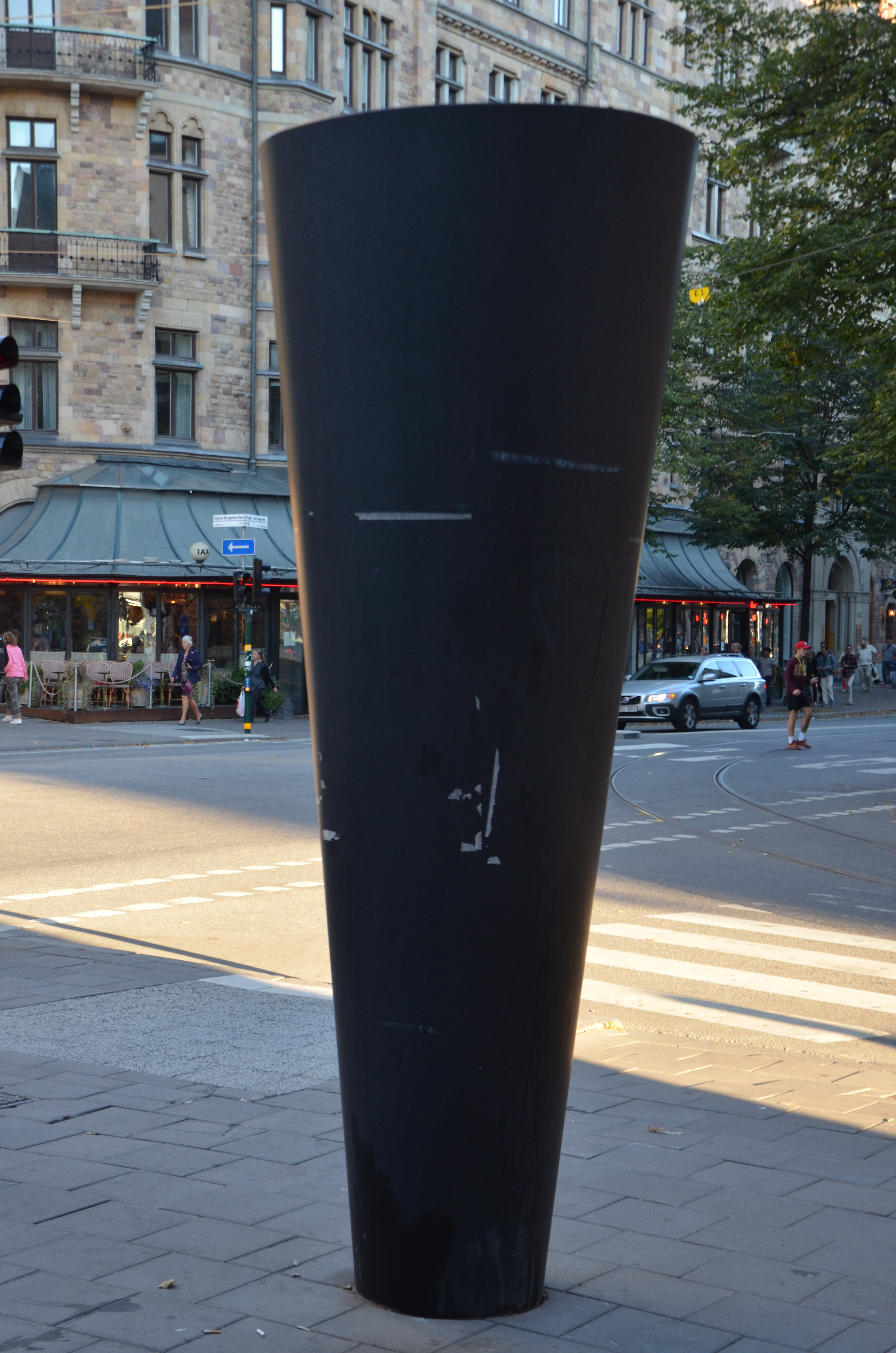 Ellipåtical Cone, diabas, 2003, sculpture by Jene Highstein Smålandsgatan/Birger Jarlsgatan in Norrmalm in Stockholm, Sweden